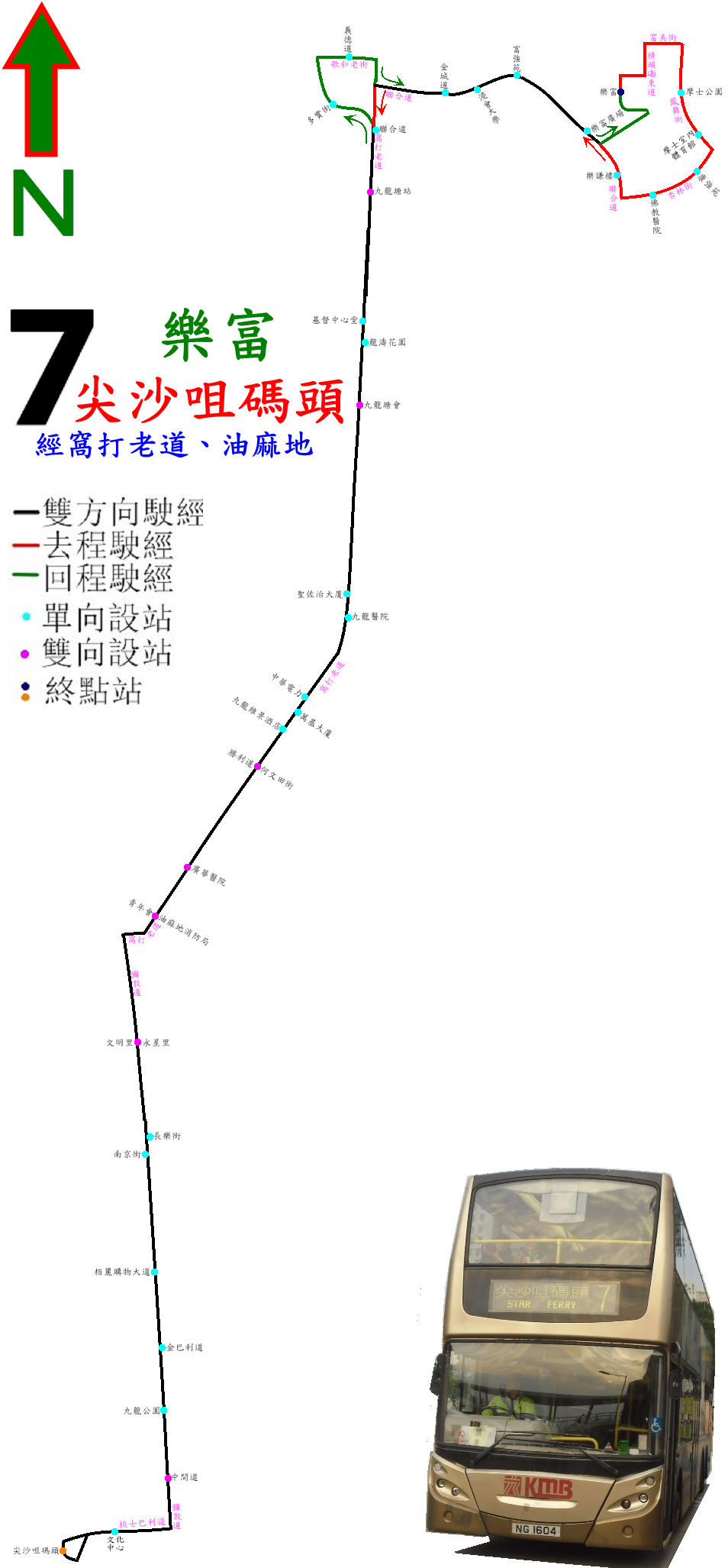 中文（香港）: 九巴7號線的走線圖